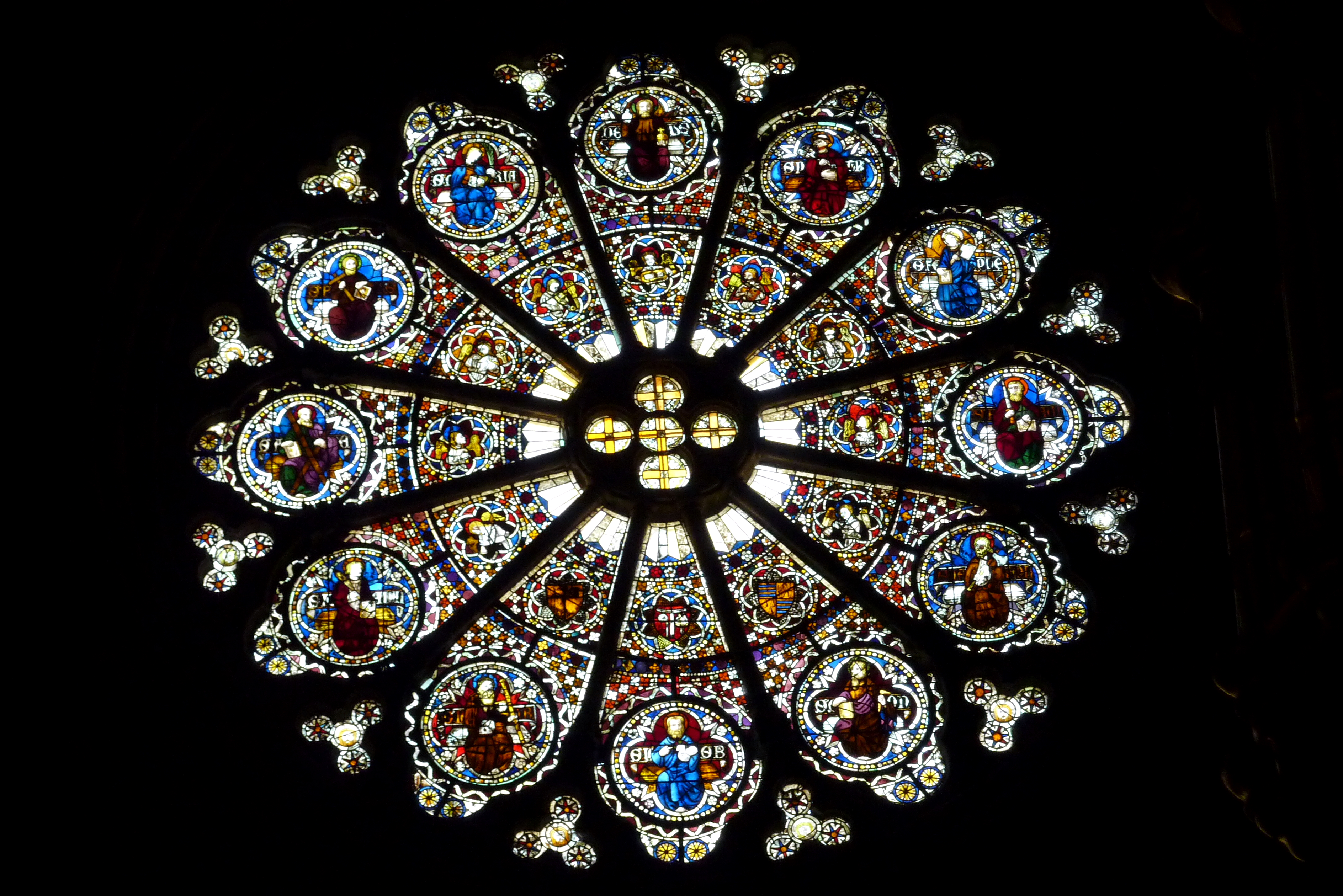 Ehemalige Kathedrale Notre-Dame in Embrun, einer Gemeinde im Département Hautes-Alpes in der französischen Region Provence-Alpes-Côte d'Azur, Rosette aus dem 15. Jahrhundert